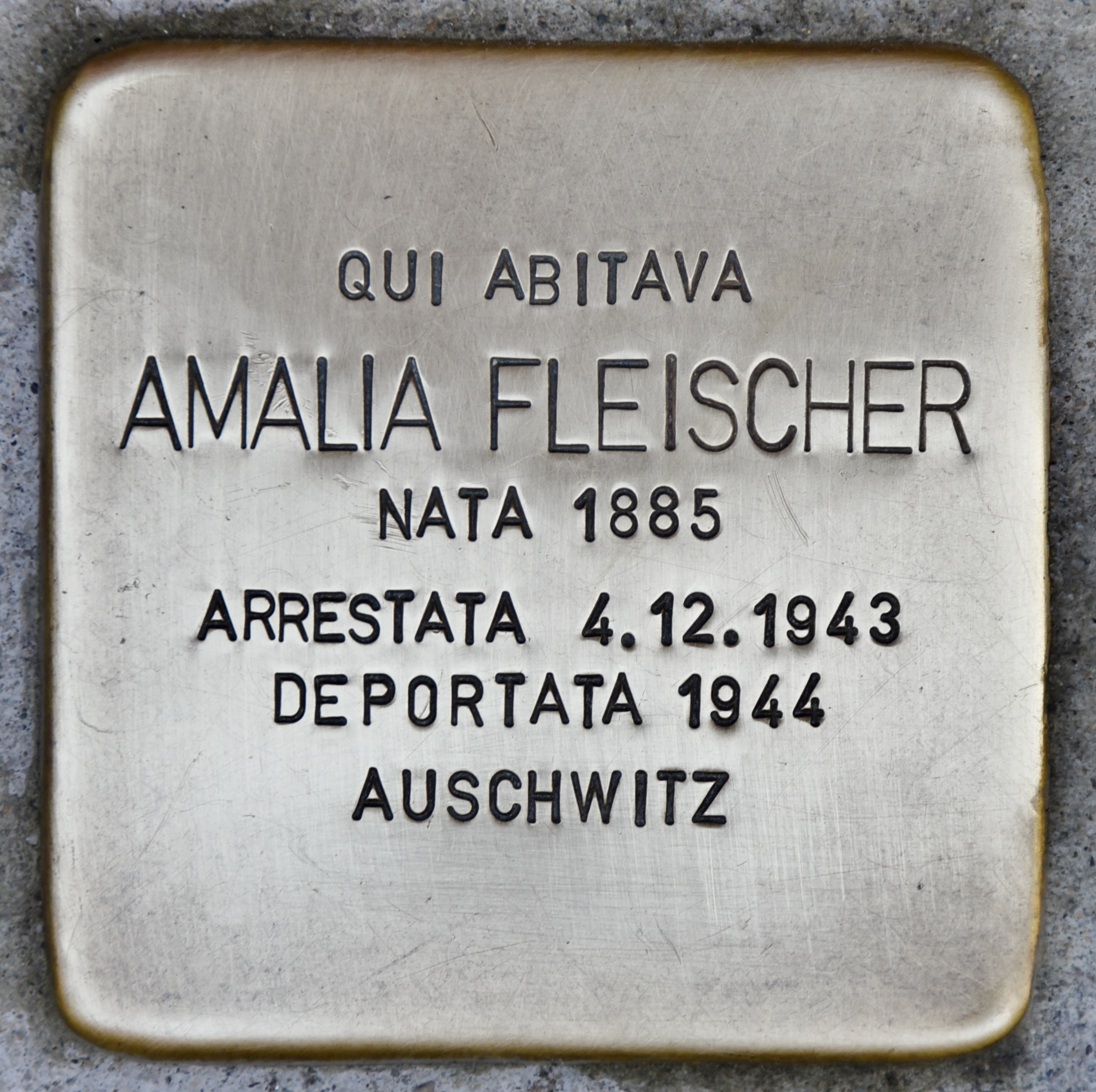 Stolperstein für Amalia Fleischer , Via della Croce 16